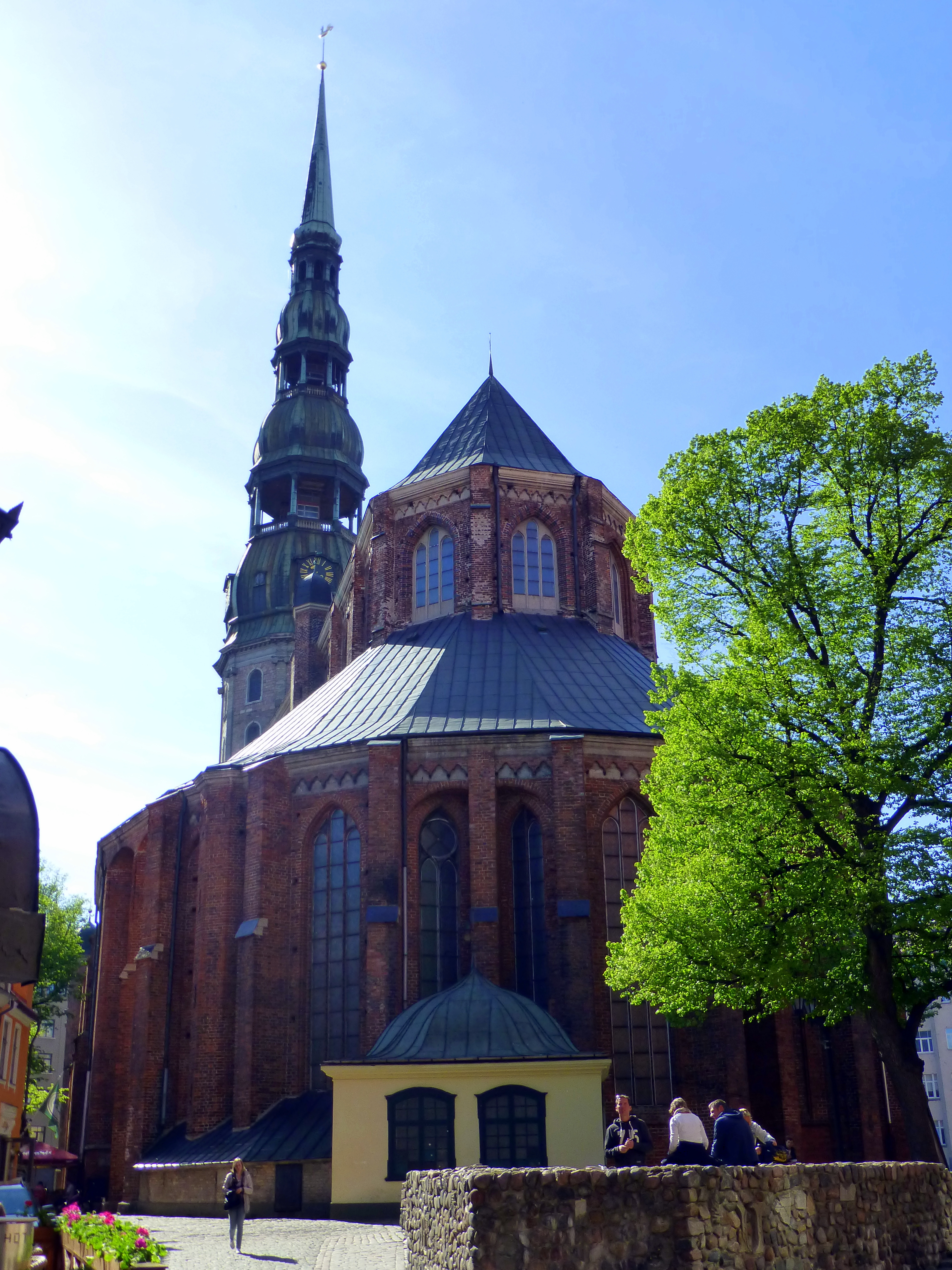 Riga - Svētā Jāņa evaņģēliski luteriskā baznīca